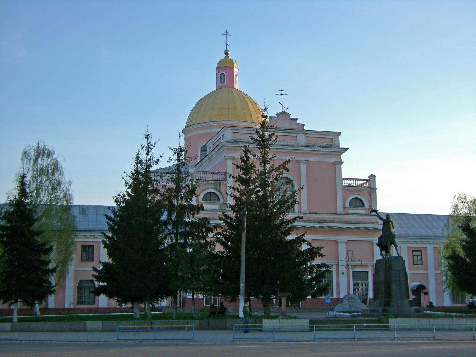 собор Рождества Христова г.Тульчин